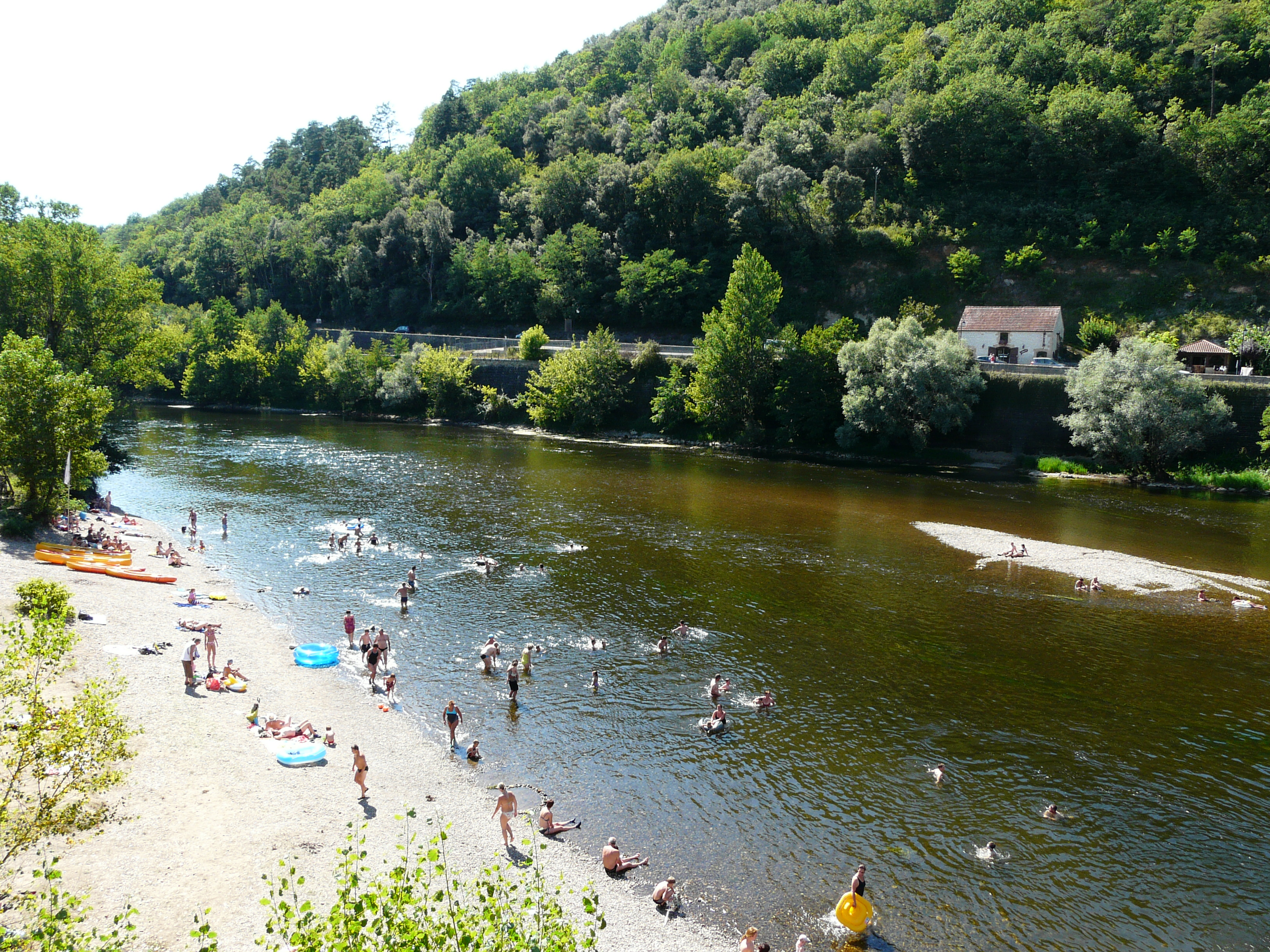 La Dordogne en aval du pont de Rouffillac, département de la Dordogne, France. Elle sert de limite entre Saint-Julien-de-Lampon à gauche et Calviac-en-Périgord à droite.